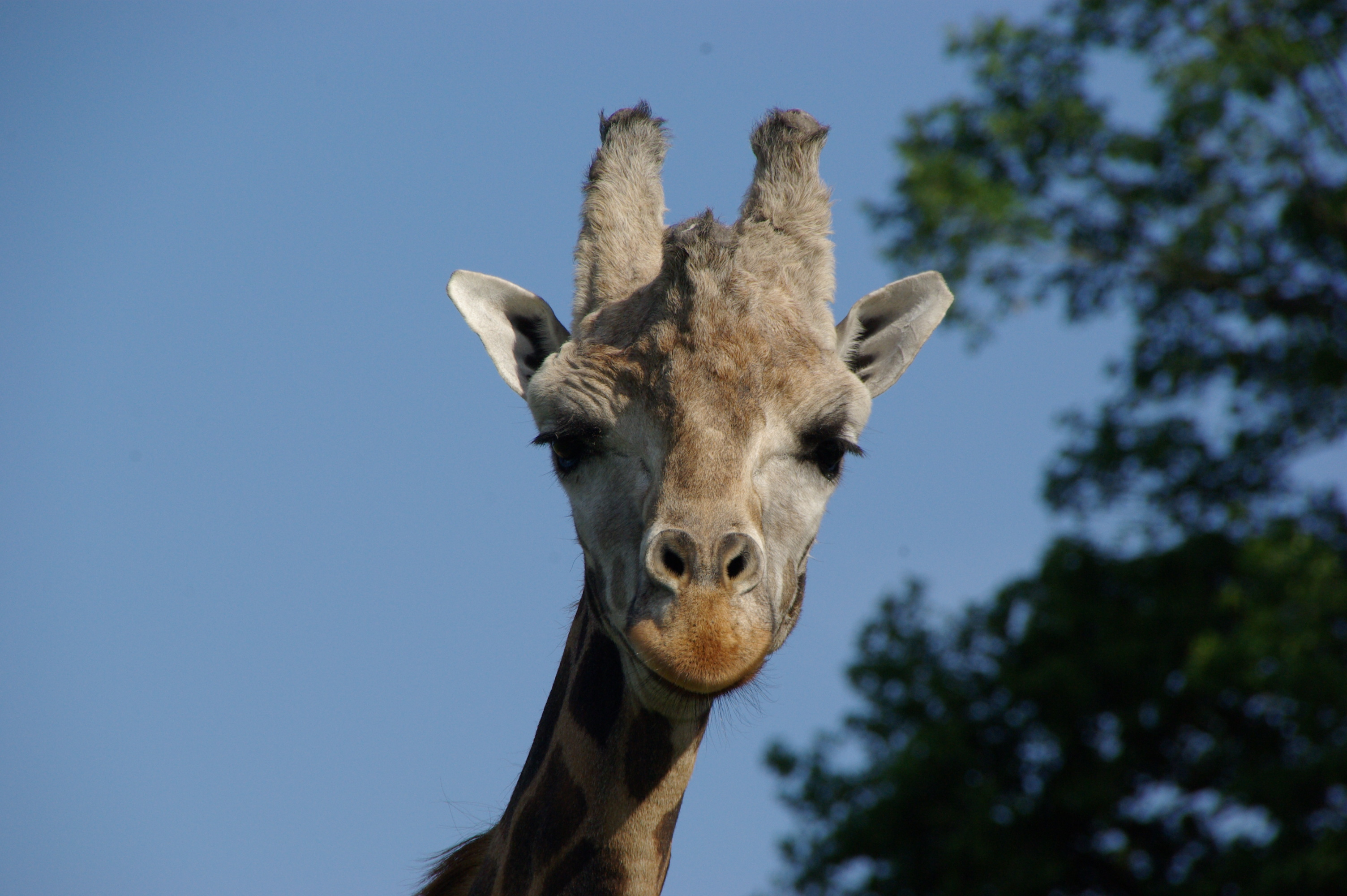 girafe